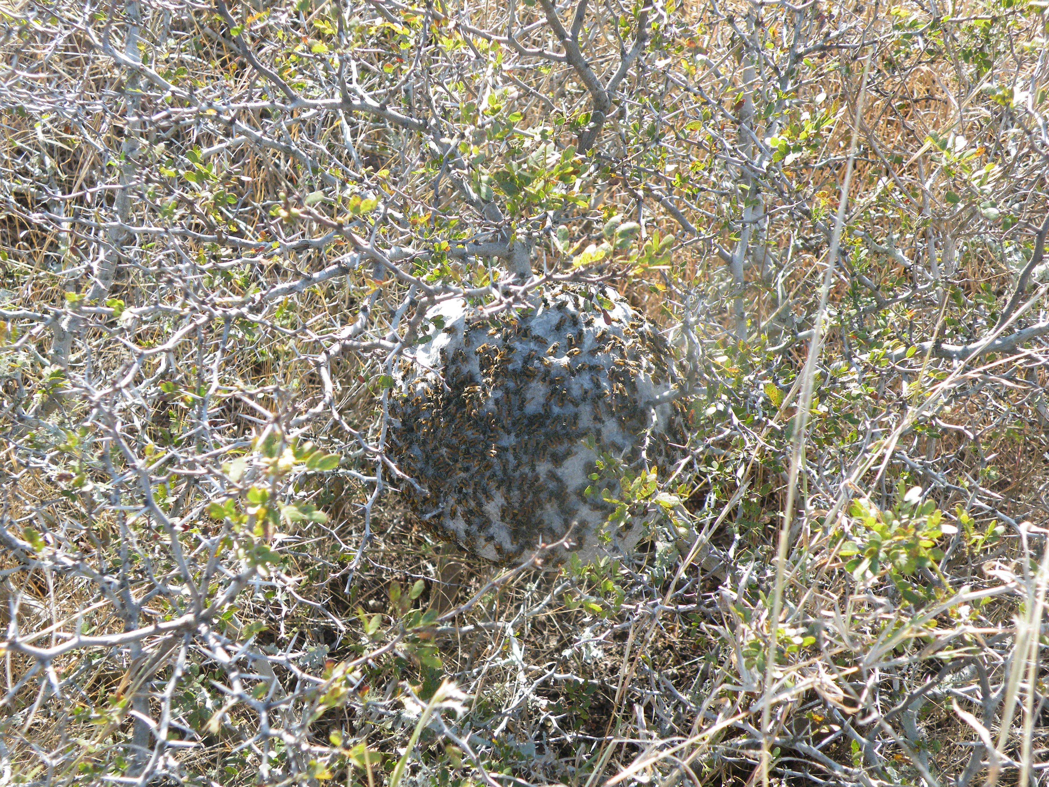 Estacion Calles, Tamaulipas